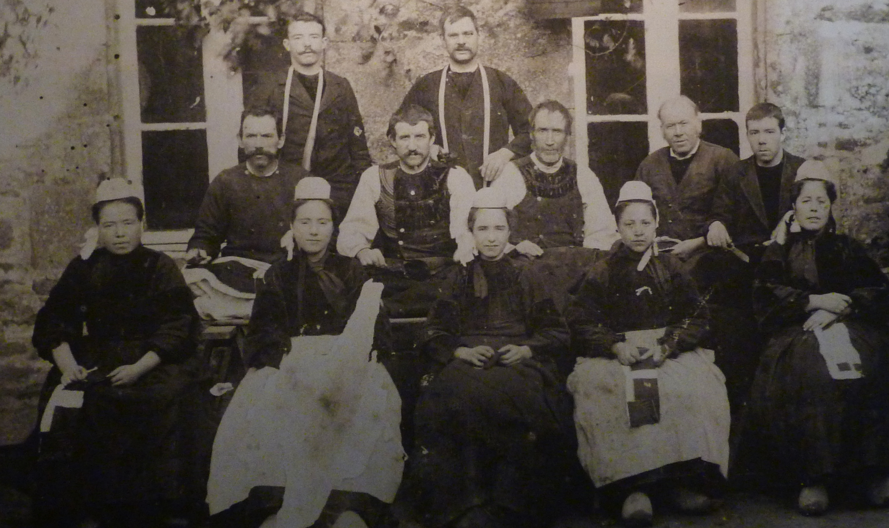 L'atelier de broderie (au fil de soie) de Marc Le Berre à Plonéour-Lanvern vers 1900 (Musée Bigouden, Pont-l'Abbé)